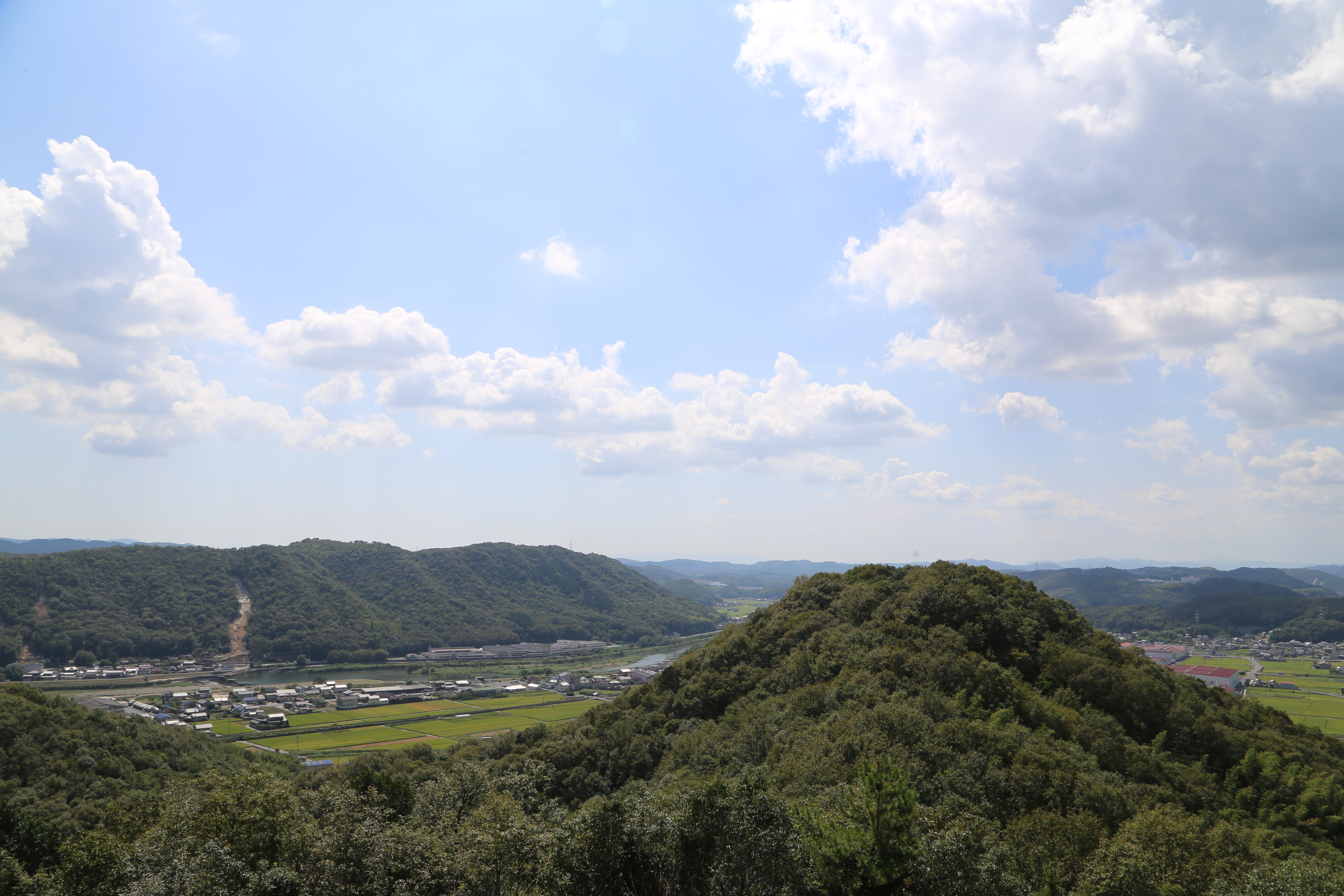 岡山県井原市高越山から井原市を望む。